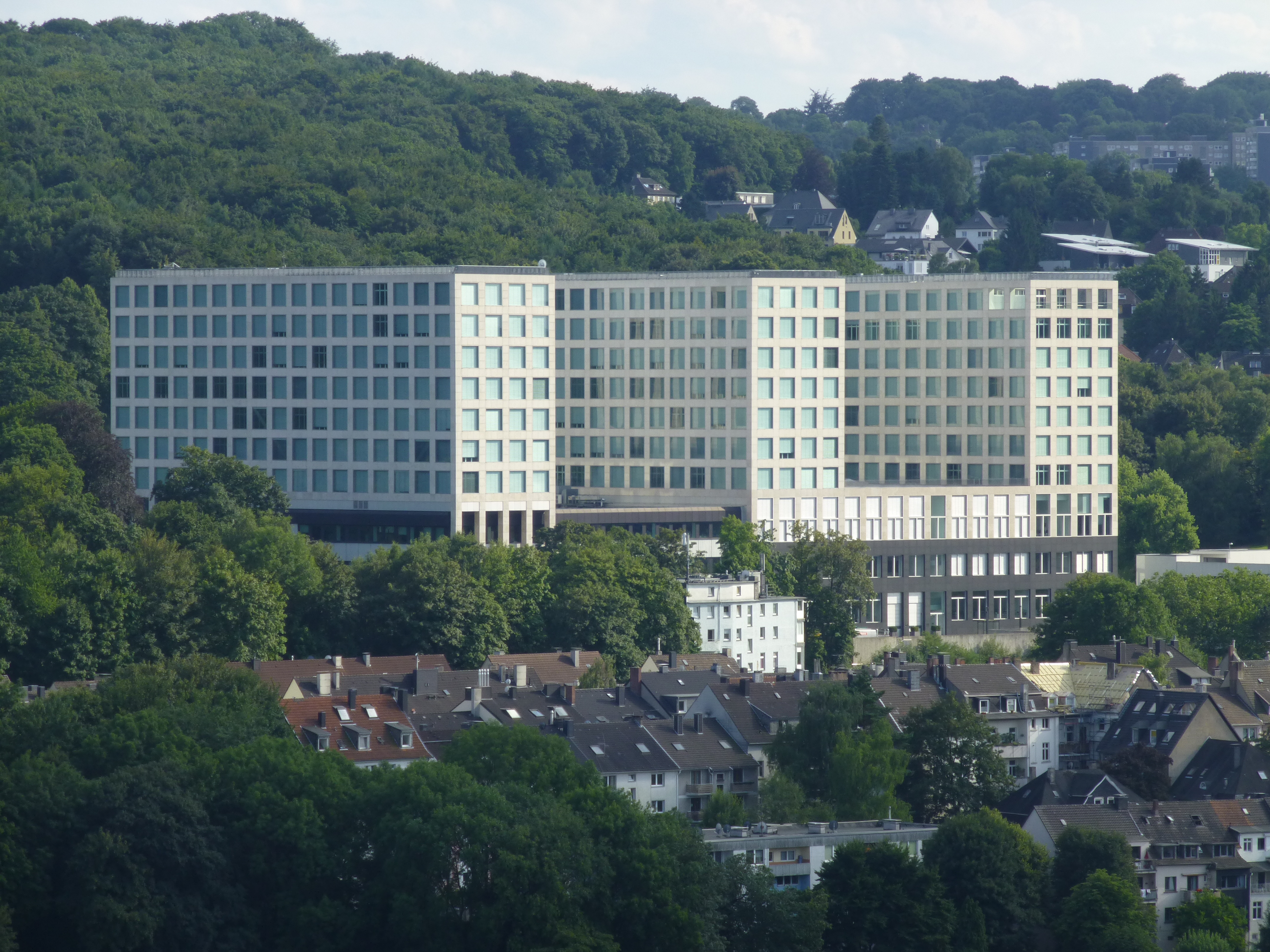 Hardt, Wuppertal